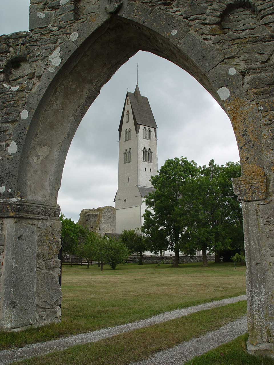 Gothems kyrka (Gotland). Blick durch das Portal des mittelalterlichen Pfarrhofes